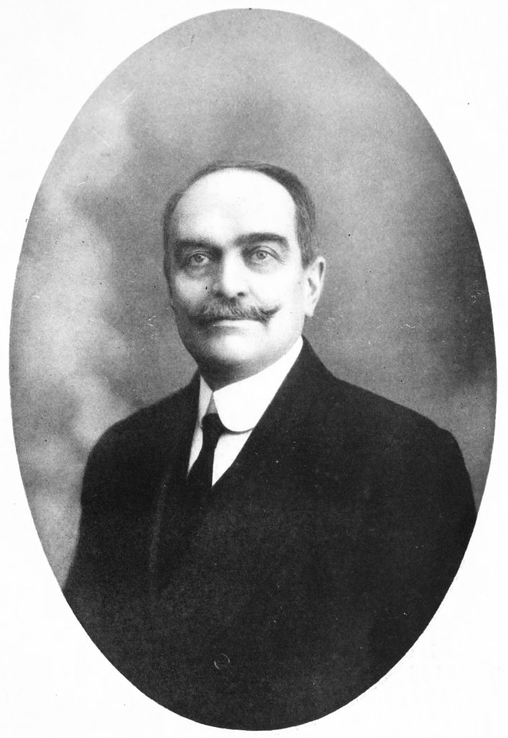 Count Emilio Turati, Italian entomologist